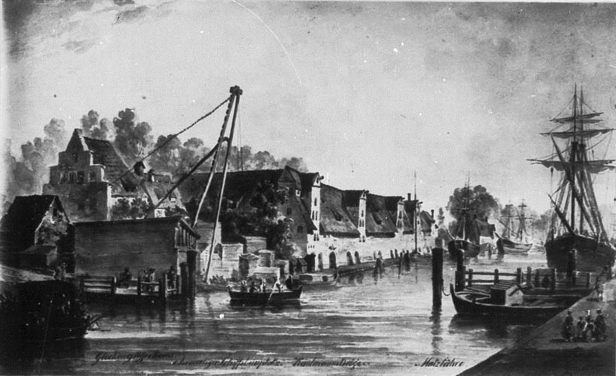 Christian Peter Stolle: Lübecker Hafen mit Gießhaus und Dröge, Aquarell, 1881, Museim für Kunst und Kulturgeschichte Lübeck